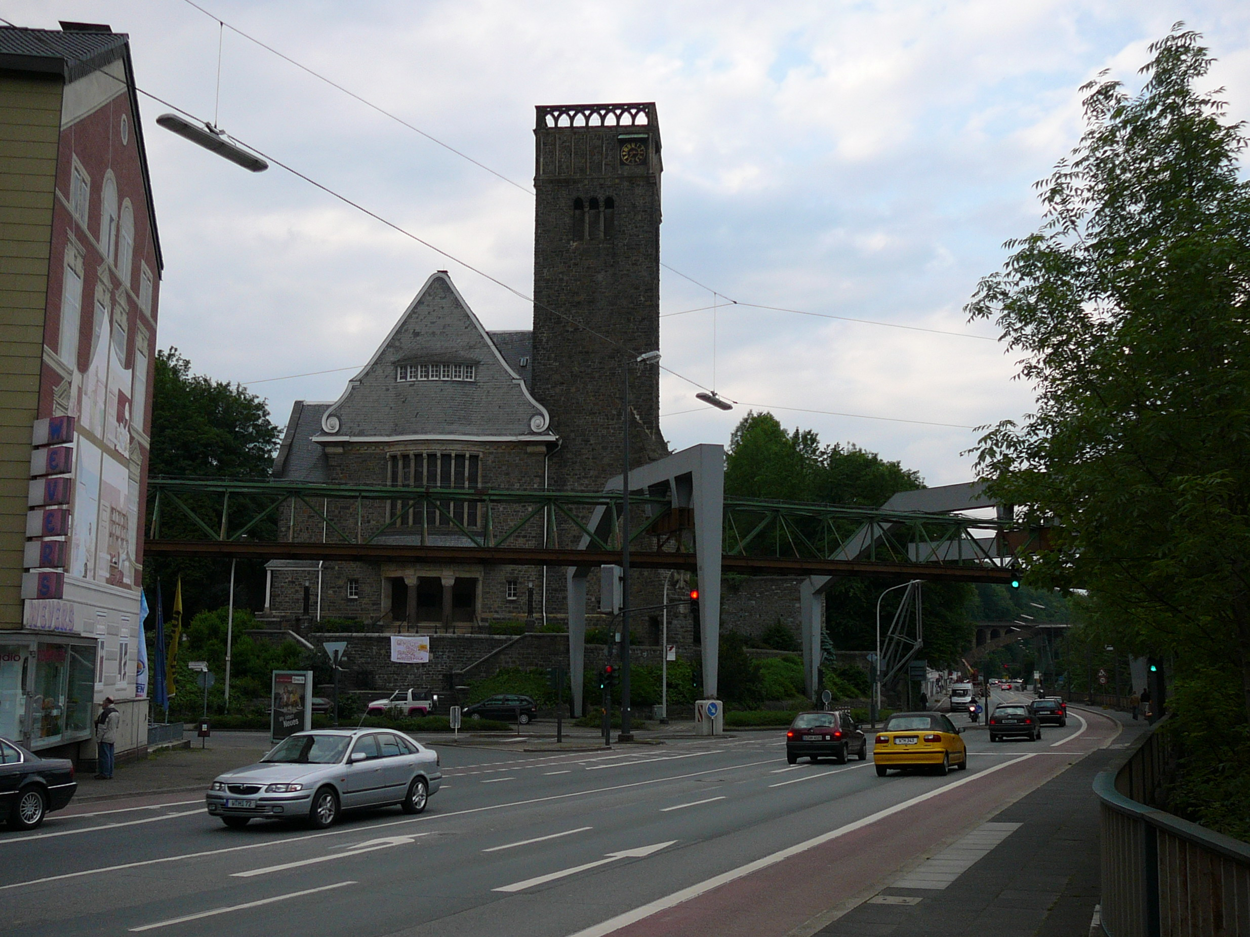 Hauptkirche Sonnborn, Wuppertal